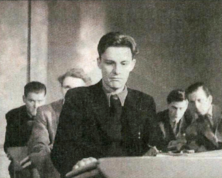 Alf Kjellin som gymnasisten Jan-Erik i Alf Sjöberg film Hets efter ett manus av Ingmar Bergman.